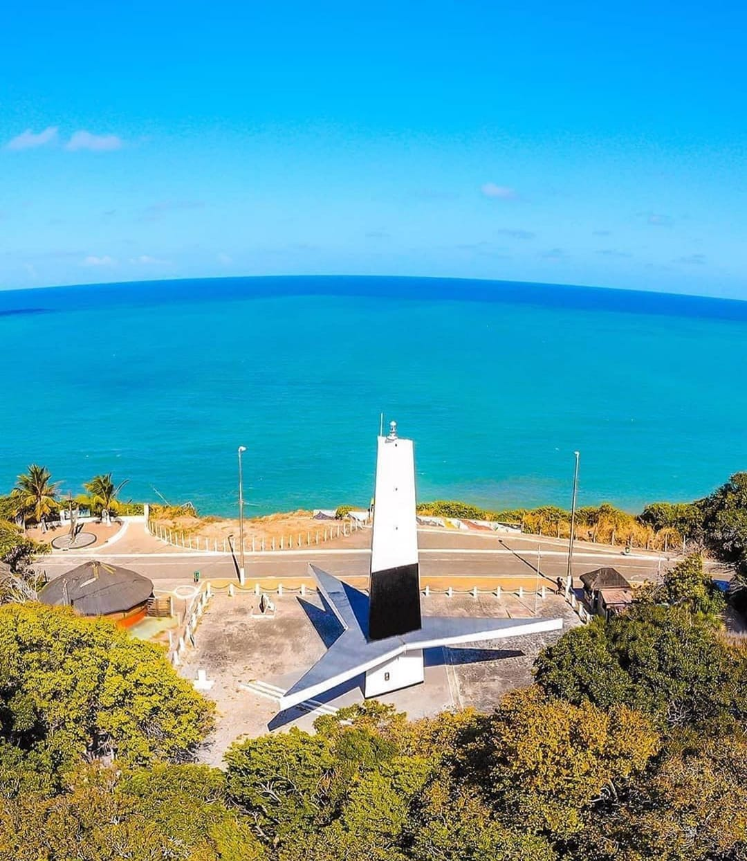 praia ponta do seixas farol de cabo branco joao pessoa paraiba